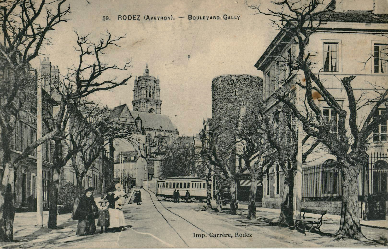 Carte postale ancienne éditée par Carrère à Rodez, n°59 RODEZ - Boulevard Gally